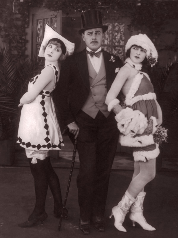 Photo publicitaire de 1919 représentant Ford Sterling entouré par Marvel Rea (à gauche) et Alice Maison (à droite). Photographie recadrée et retouchée d'une image dans le domaine public mise en ligne par la Library of Congress